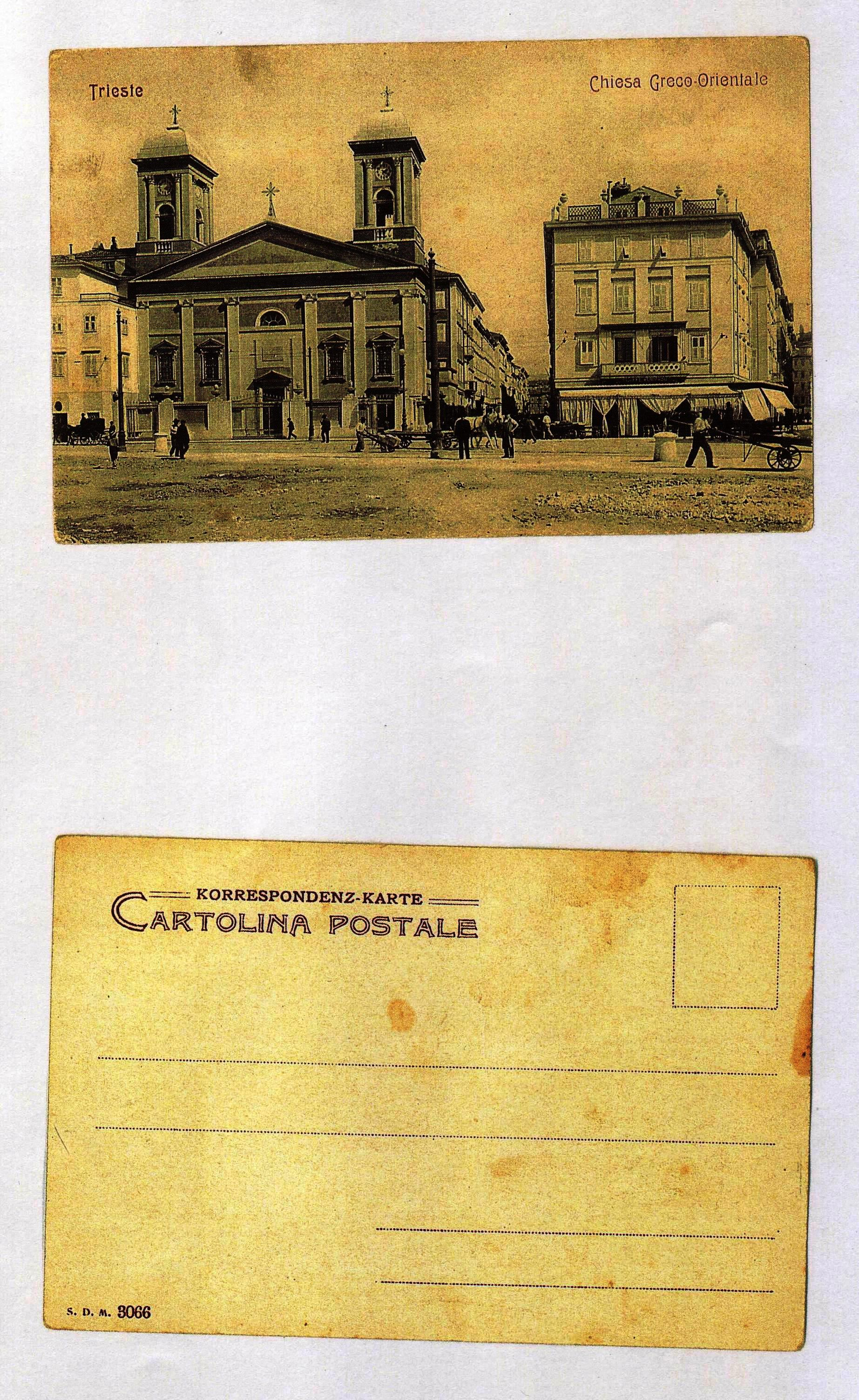 Κάρτ ποστάλ από την Τεργέστη που έφερε μαζί του ο παπα-Σταύρος Τσάμης κατά την επιστροφή του